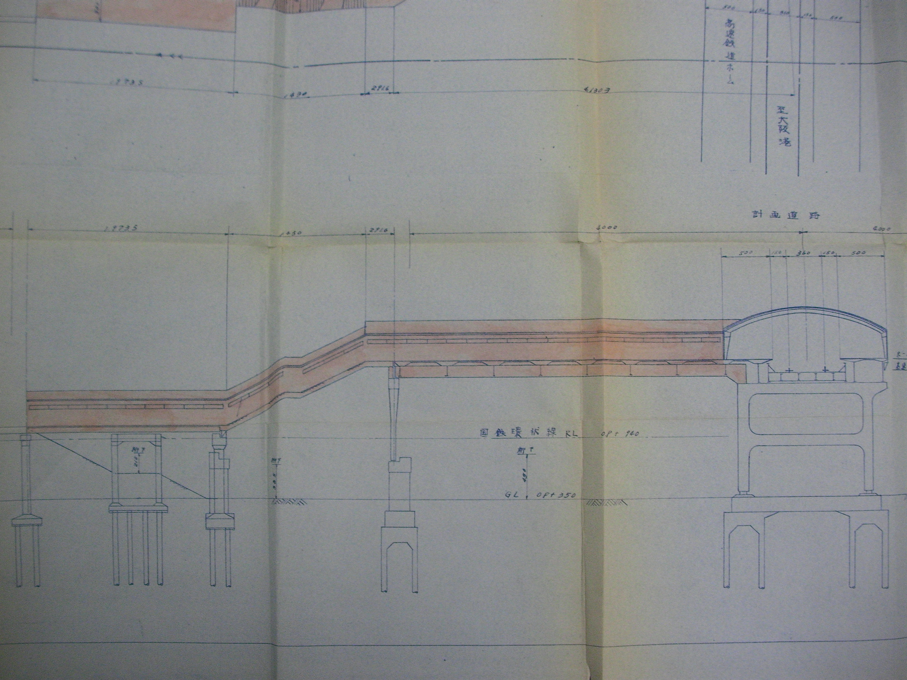 大阪市交通局から国鉄へ提出された、弁天町駅における連絡通路の設計図。岩村潔『大阪市地下鉄の歩み』によると、ホームから直接連絡できるように国鉄側と何度も交渉したが採用されず、結局現在のような形となった。